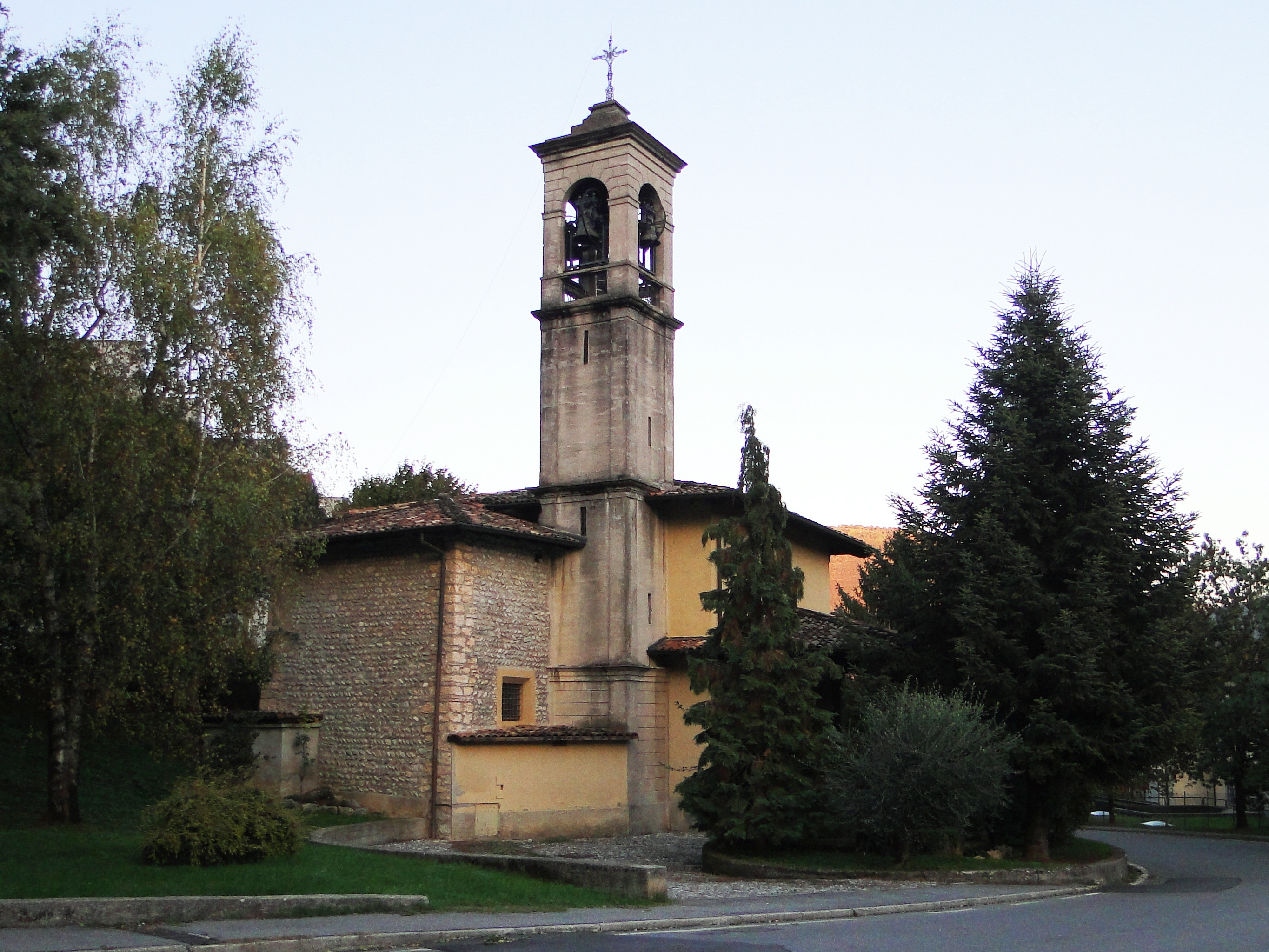 Albino (BG), chiesa della Beata Vergine della Concezione